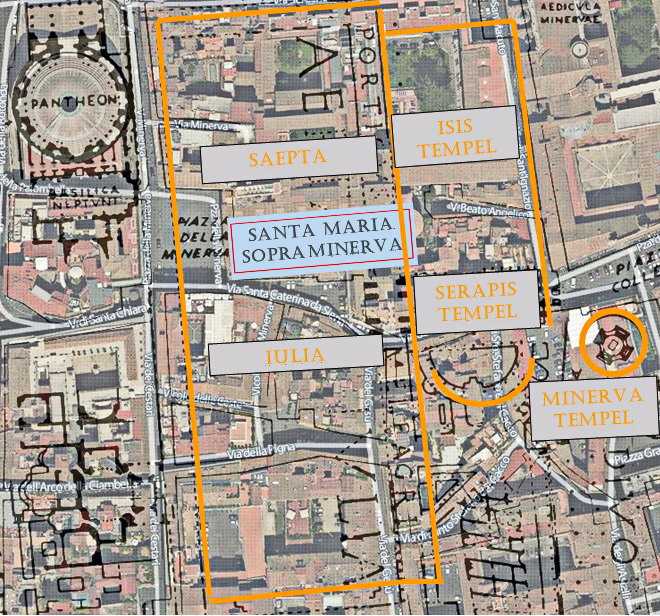 Santa Maria sopra Minerva (Rom); Topographie der frühen Kaiserzeit